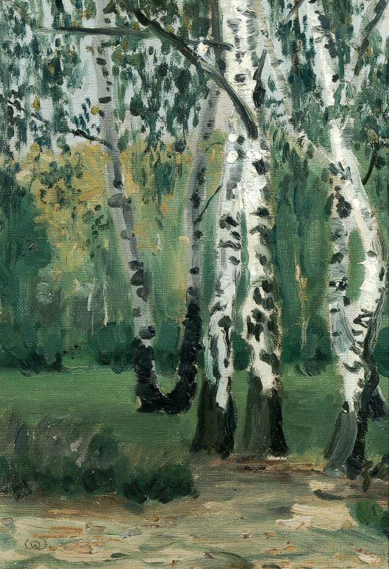 Birken am Heiderand. Um 1904/1905. Öl auf Leinwand, 28,5 x 20,7 cm